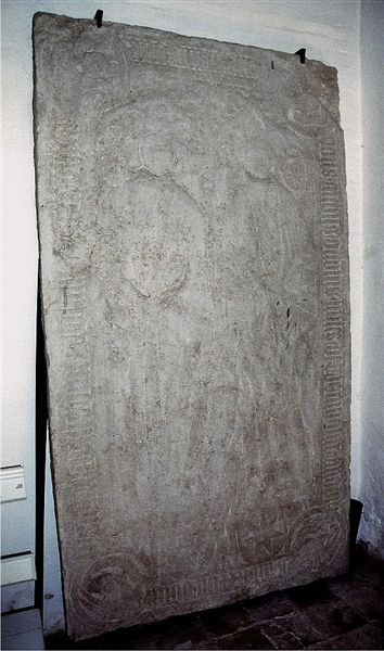 Hornslet Kirke i Danmark. Gravsten i våbenhuset over Erik Ottesen og Sophie Gyldenstierne